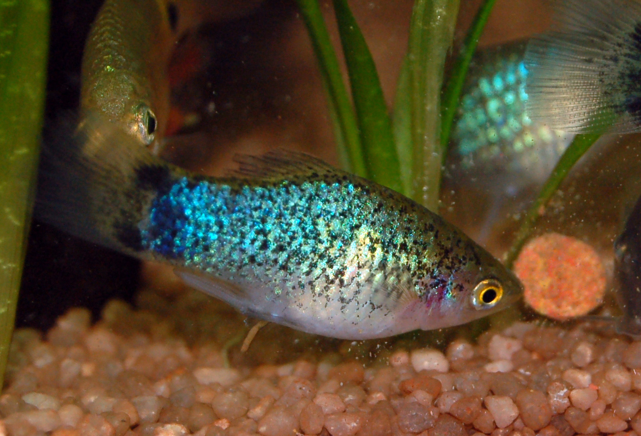 Xiphophorus maculatus blue